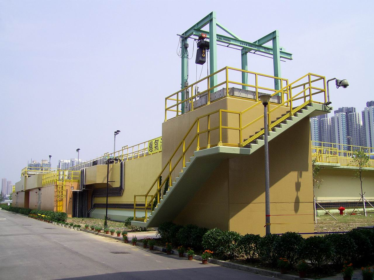 沙田污水處理廠曝氣池